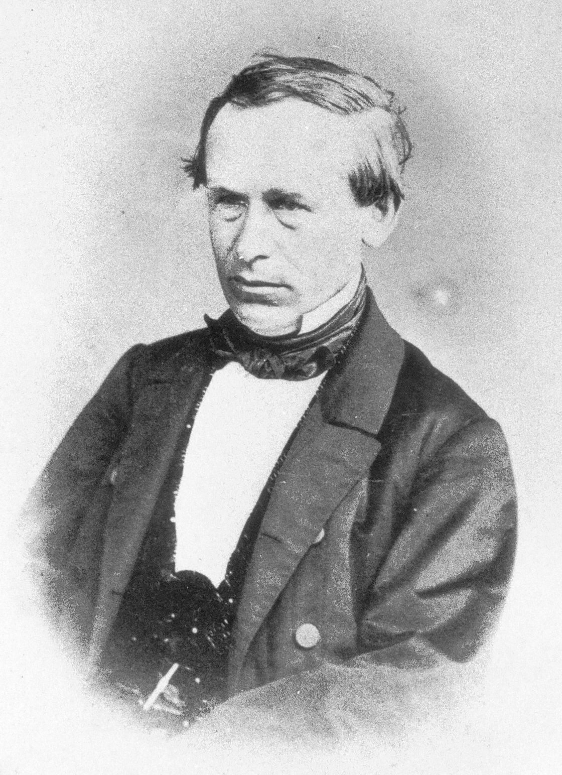 Carl Zumwinkel (1821 - 1913), Ehrenbürger der Stadt Gütersloh